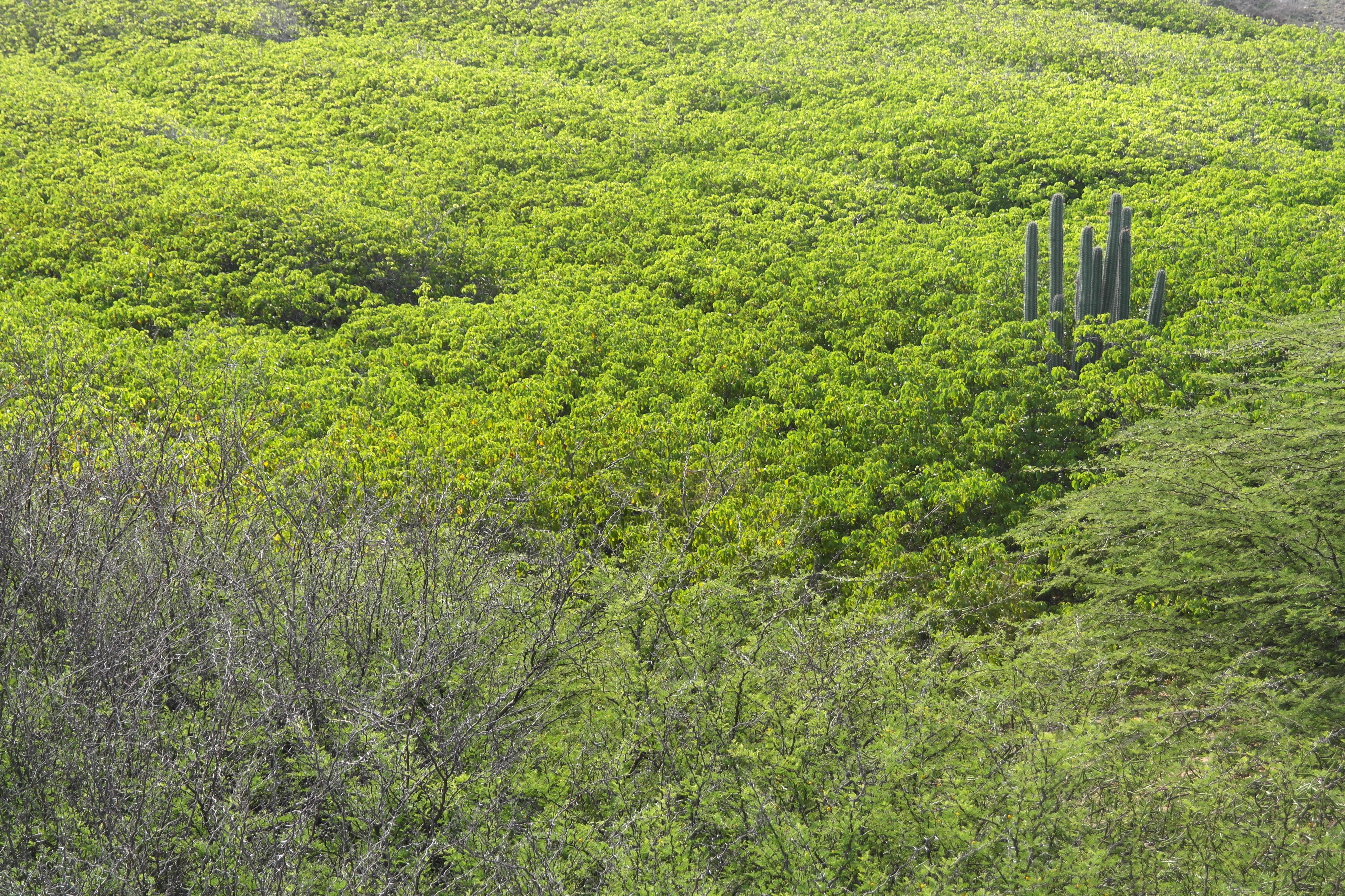 Manzanilla forest and a cactus